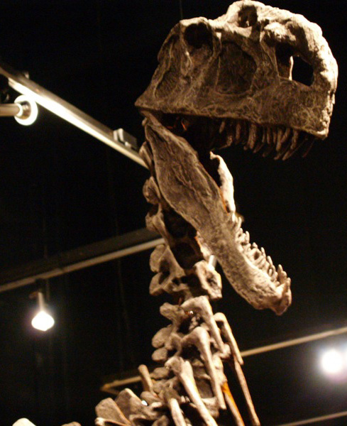 Monolophosaurus skull.